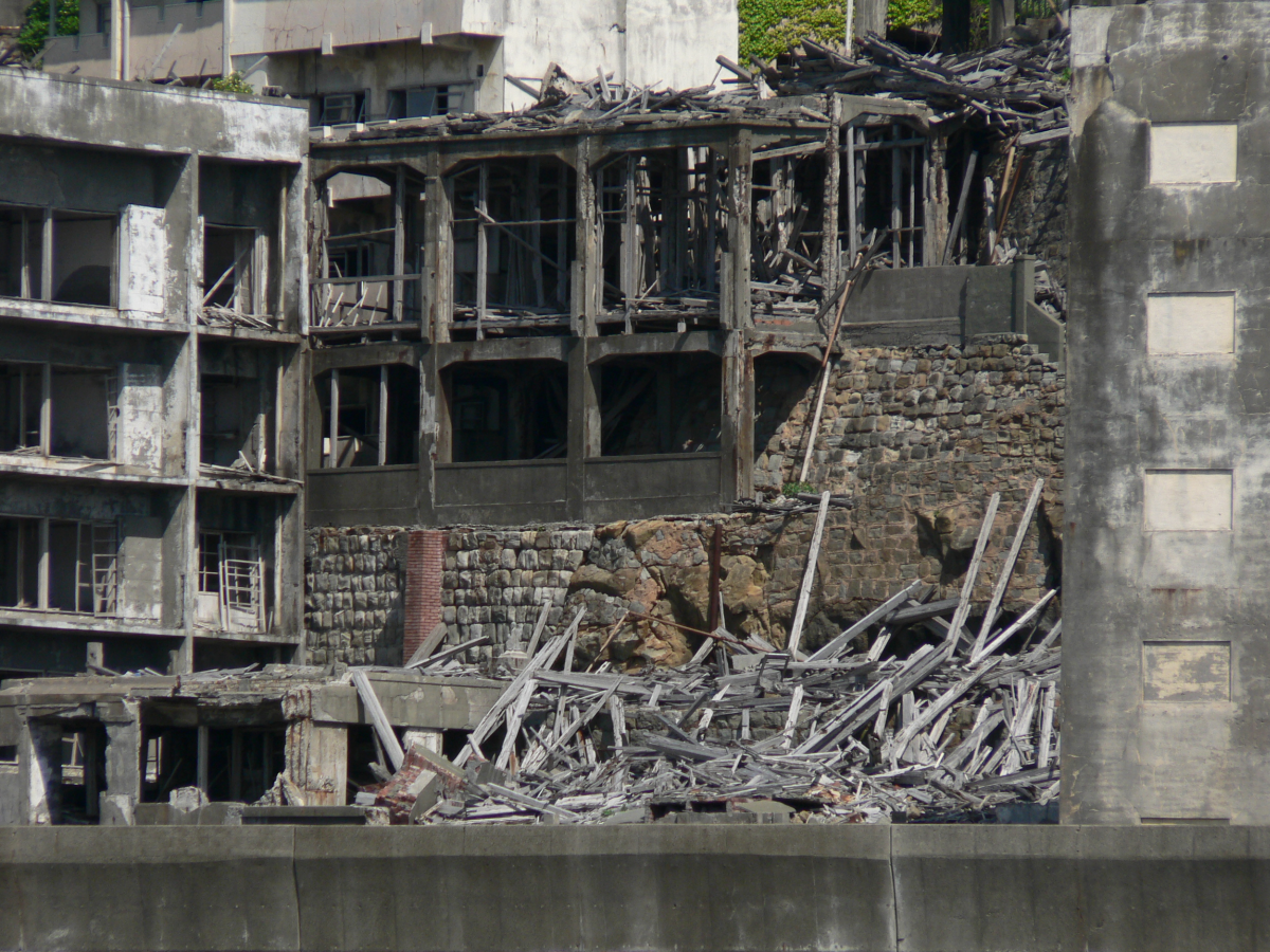 端島(軍艦島)の写真。倒壊した50号棟(映画館「昭和館」)と23号棟(1F社宅/2F泉福寺)の周辺。